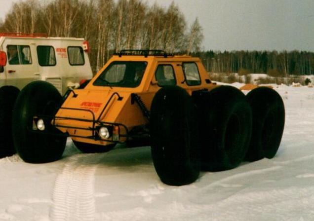 Арктика — вездеход-амфибия на шинах сверхнизкого давления, производился ассоциацией «Арктиктранс» с 1990 по 2004г.